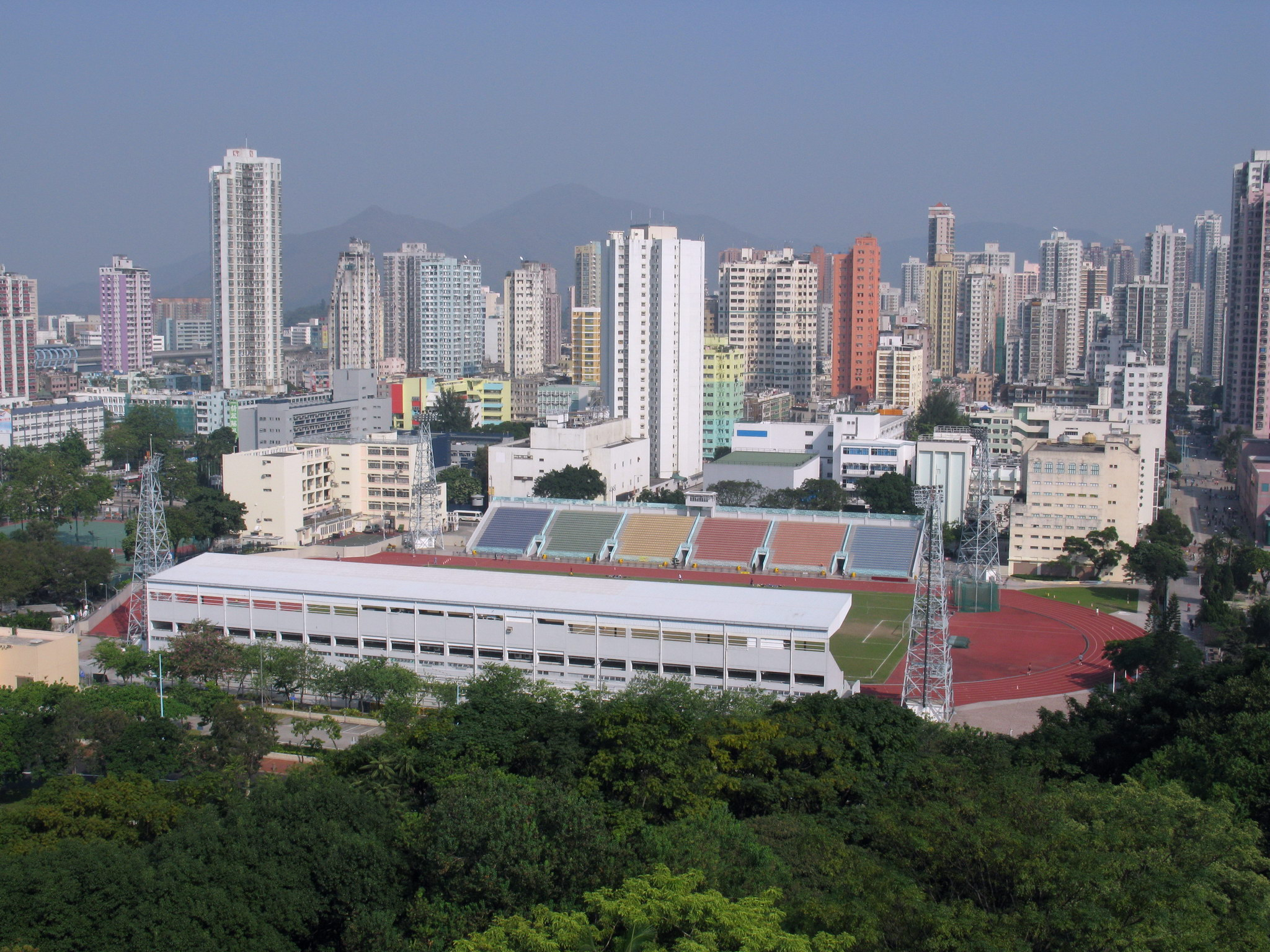 元朗大球場 Yuen Long Stadium